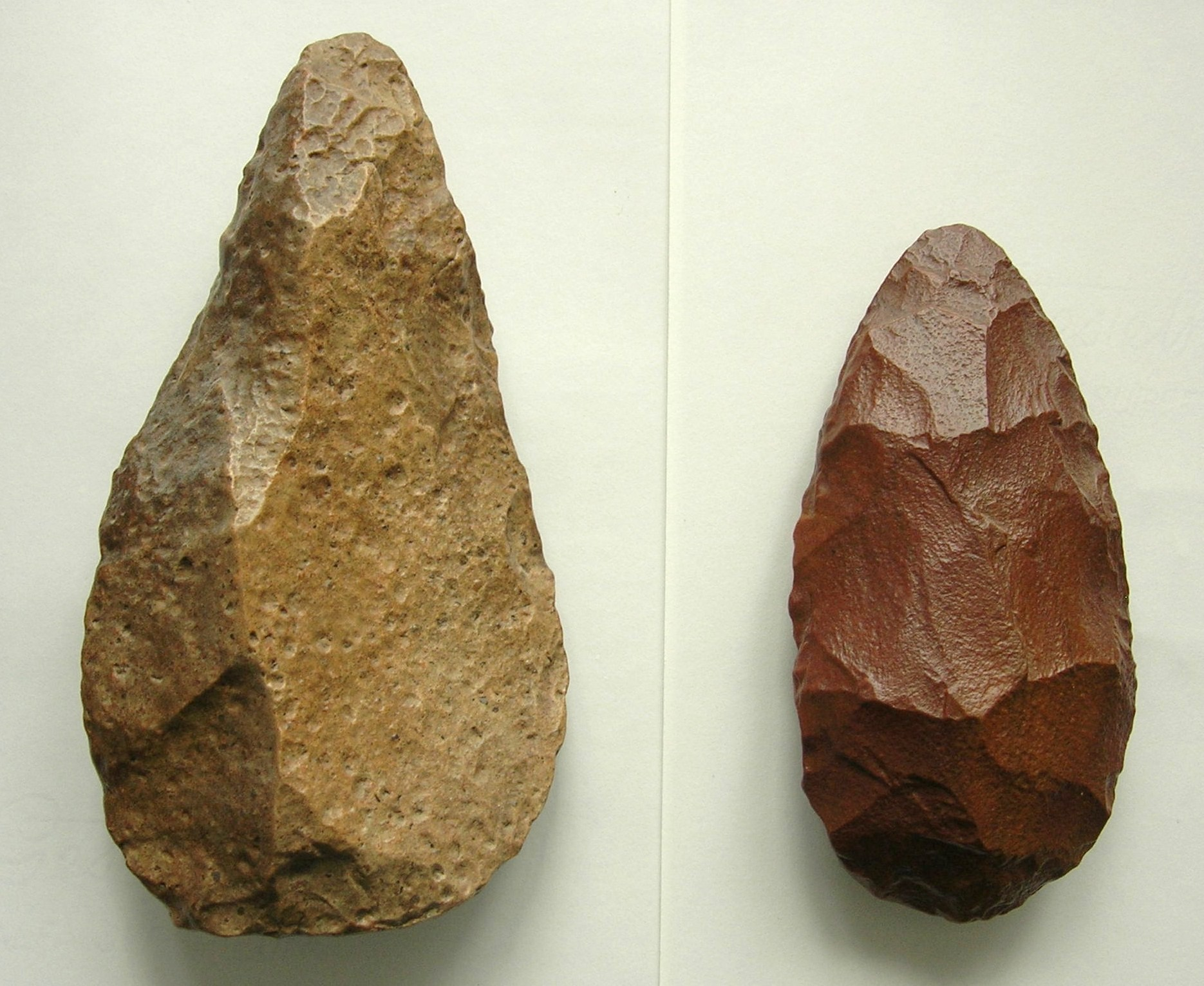 Bifaces (hauteur: 17,5 cm et 14,5 cm) provenant de la région de Ouargla (Algérie)